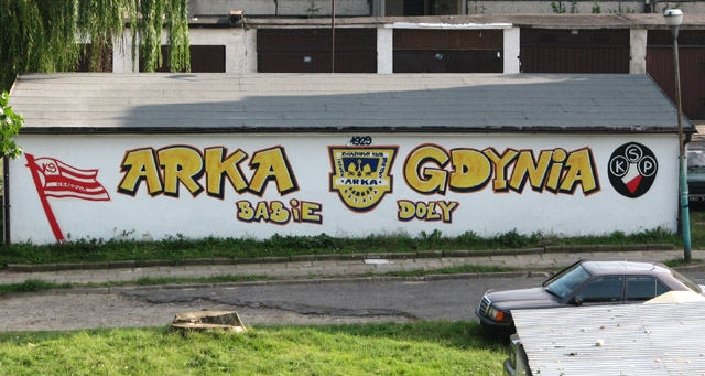 Graffiti wykonane przez kibiców piłkarskiej drużyny Arka Gdynia z dzielnicy Gdyni - Babich Dołów. Dodatkiem są symbole zaprzyjaźnionych drużyn: Cracovii Kraków (flaga po lewej) i Polonii Warszawa (logo-herb z prawej).